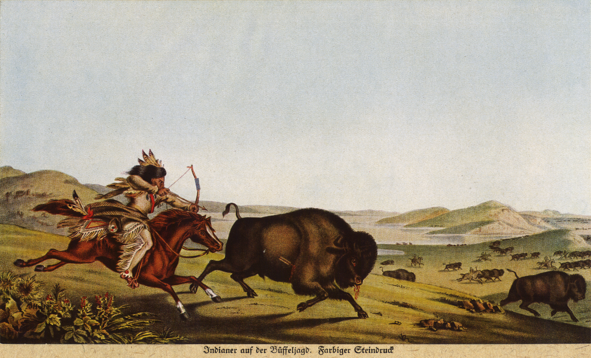 Historisches Gemälde eines amerikanischen Ureinwohners auf einem Pferd reitend, der mit Pfeil und Bogen einen Büffel jagt. Hunting the Buffalo, 1838, lithograph by J. T. Bowen, 11 inches x 16 inches